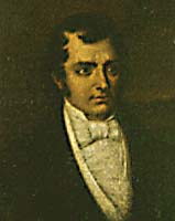 Juan José Castelli (1764-1812), Argentine statesman